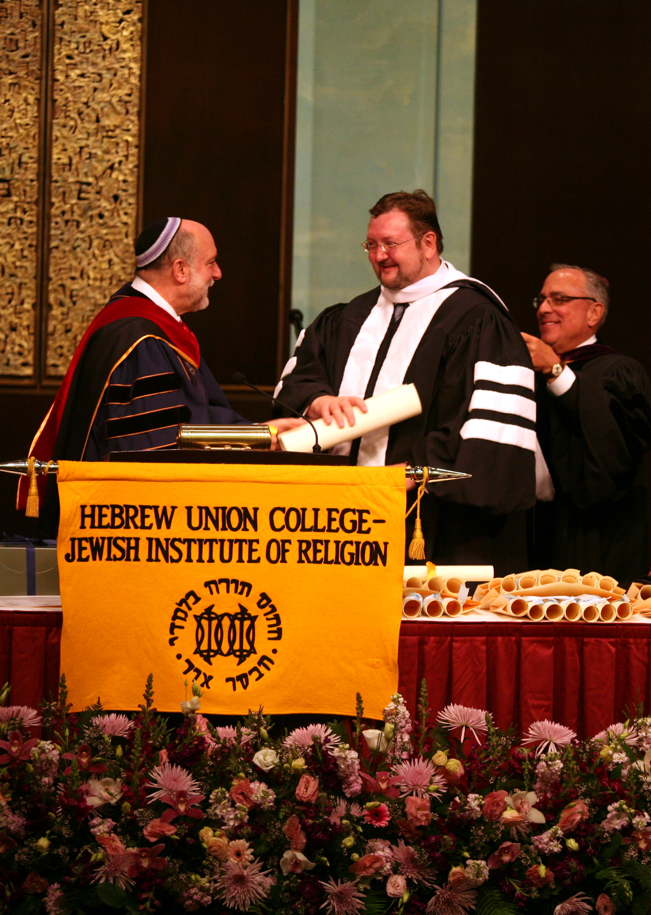 Ehrenpromotion 2009